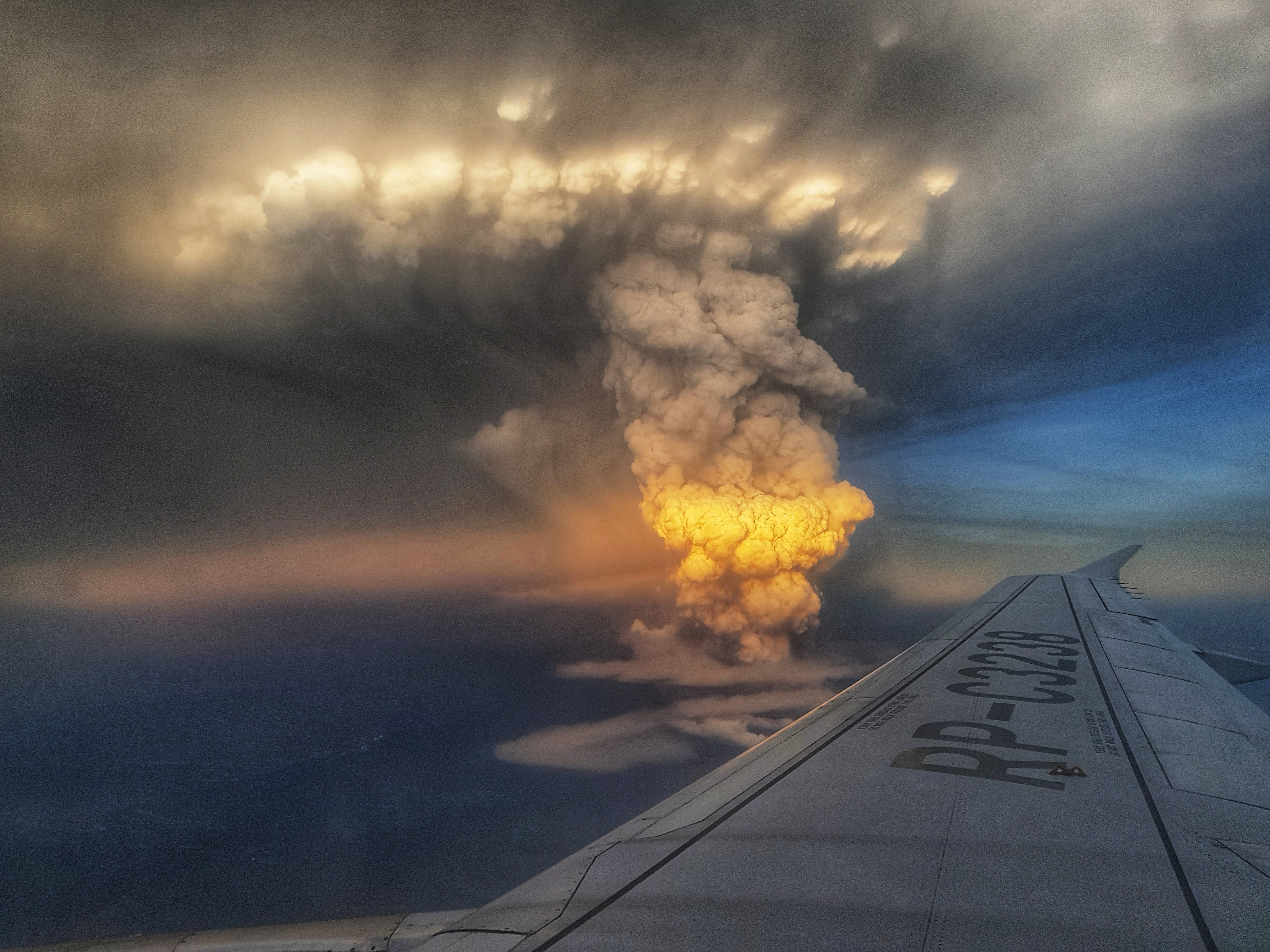 התפרצות הר הגעש כפי שנצפה ממטוס ב13 בינואר 2020